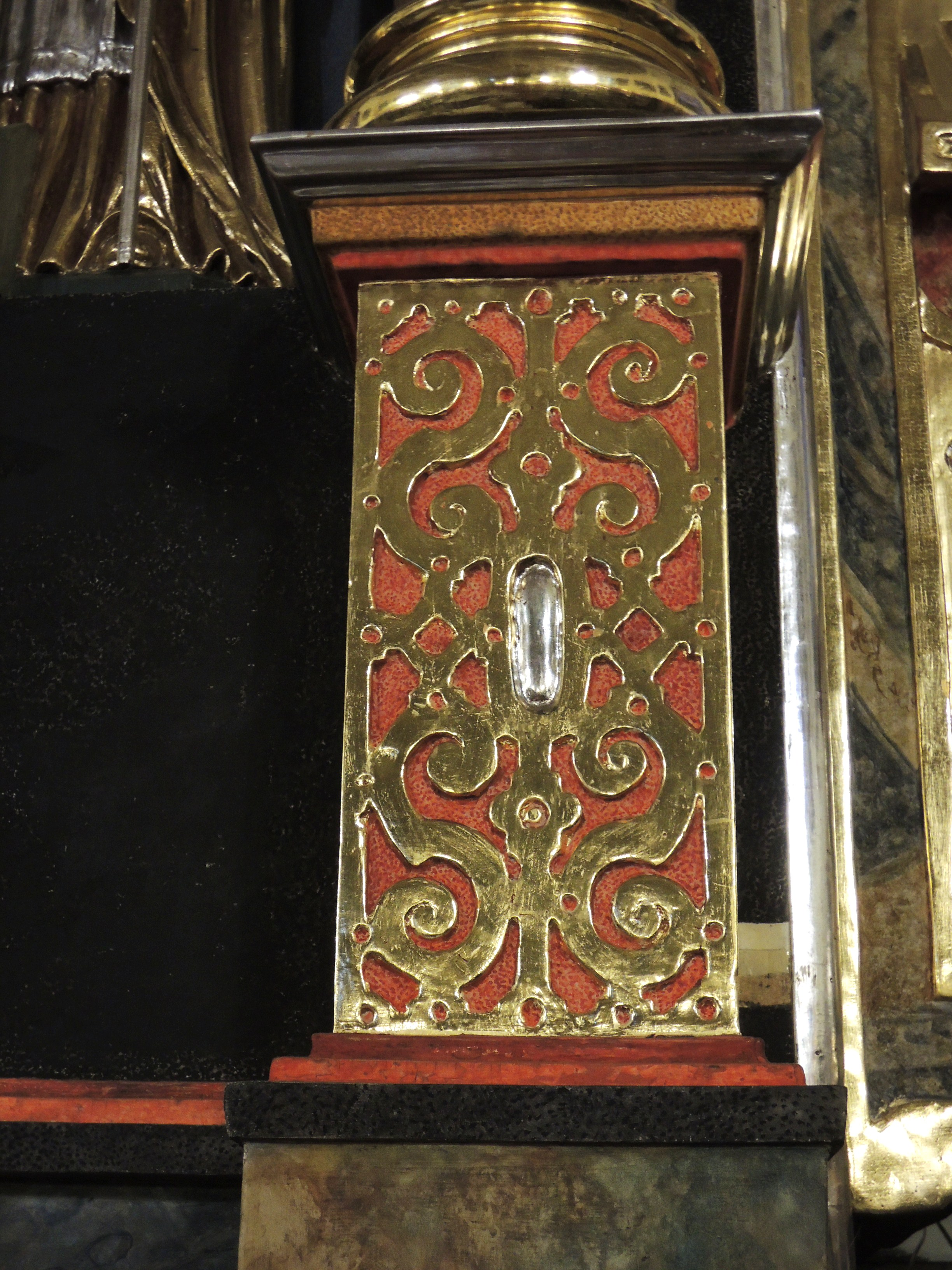 Kaboszon i ornament okuciowy. Dekoracja ołtarza głównego w drewnianym kościele w Boronowie